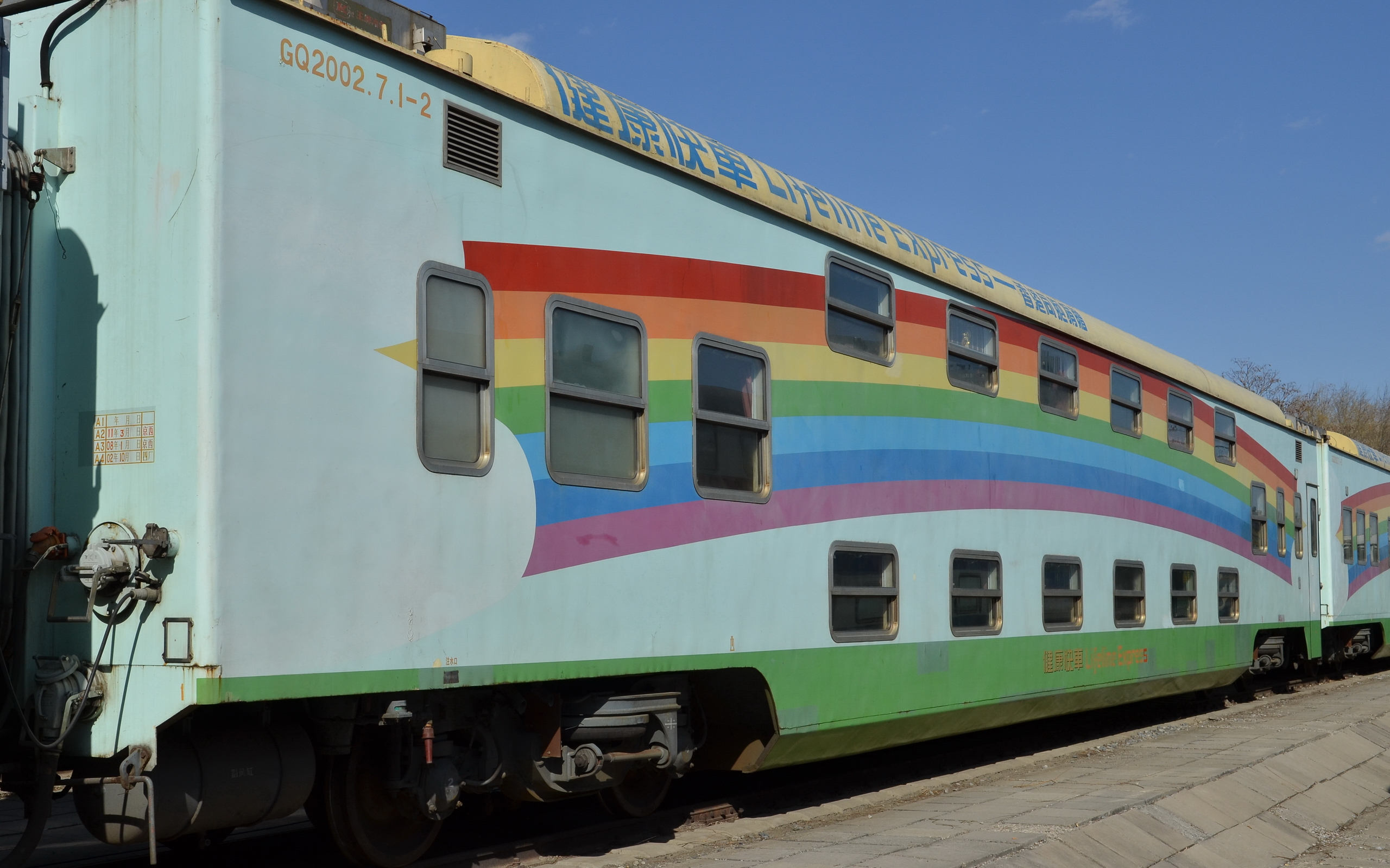 第三列健康快车中的2号车